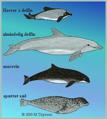 Sammenligning af størrelserne på hectors delfin, almindelig delfin, marsvin og spættet sæl